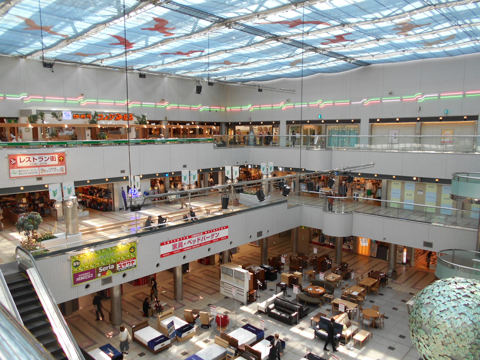 ぴぃぷぅ広場